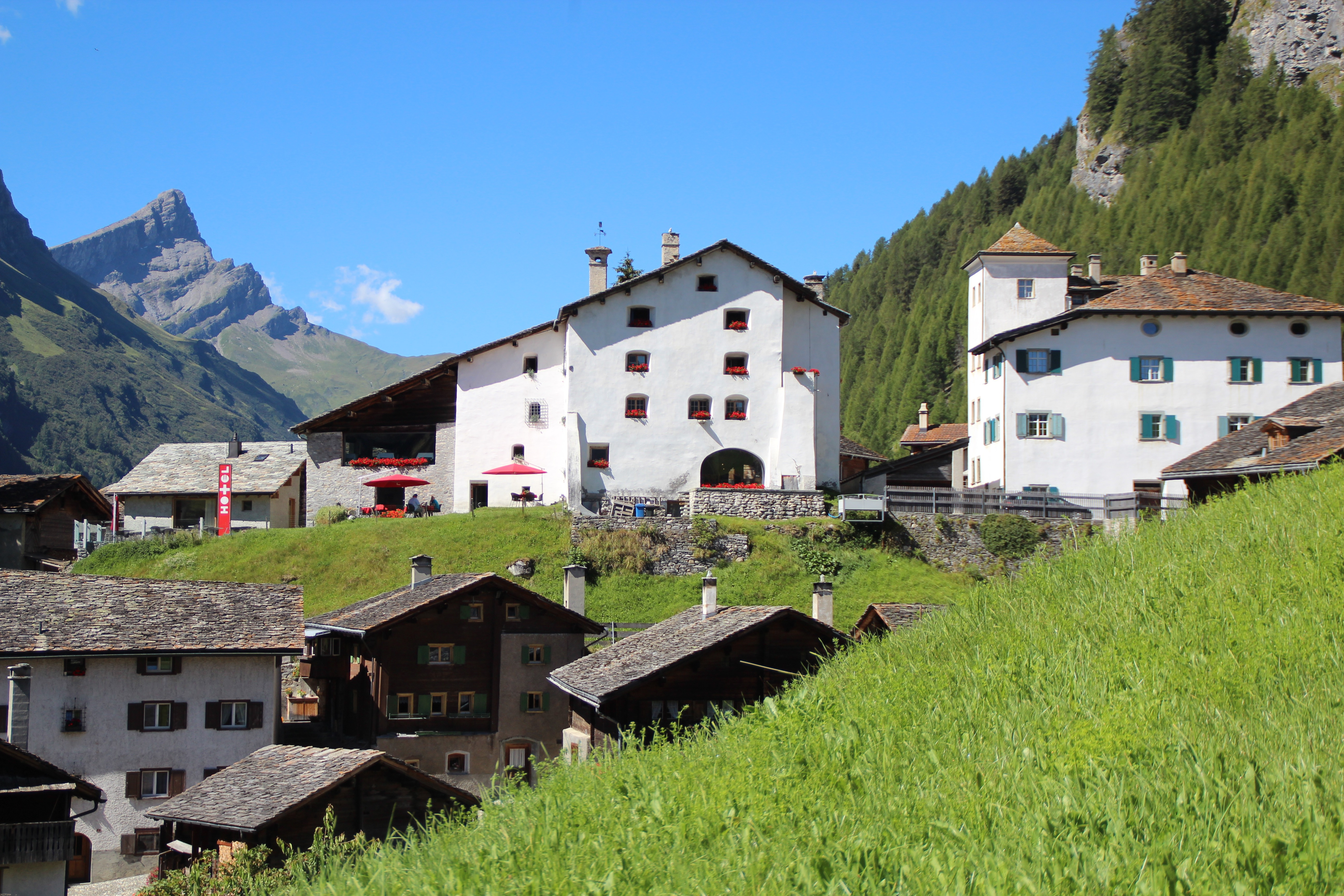 Reformierte Kirche Splügen von Osten